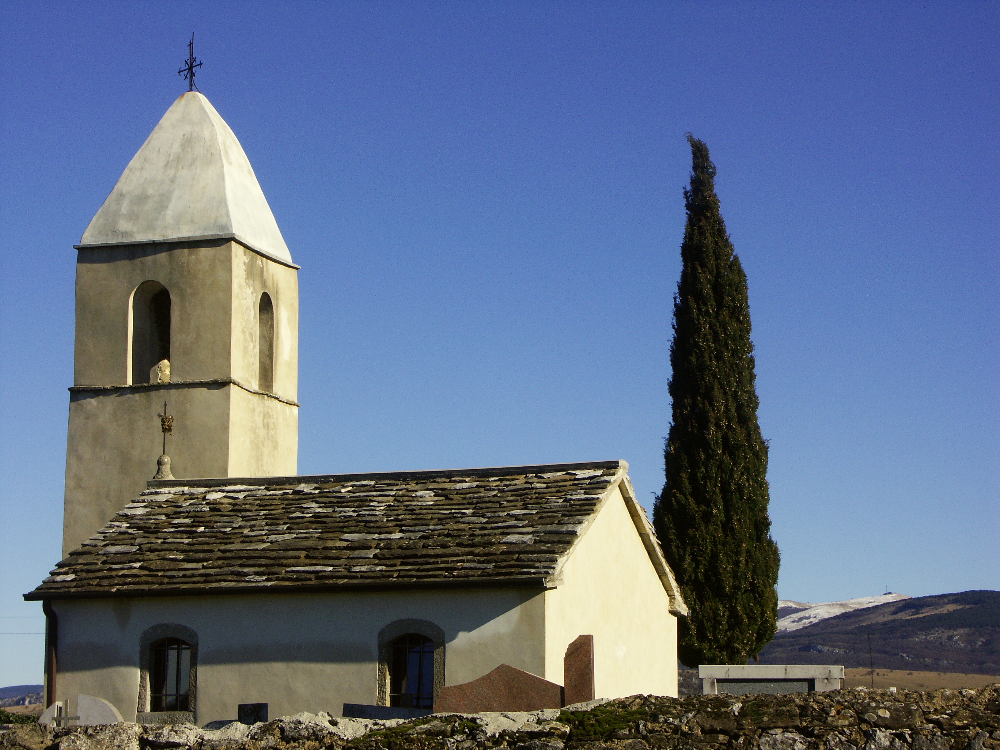 Cerkev Svetega Kvirika nad Sočergo